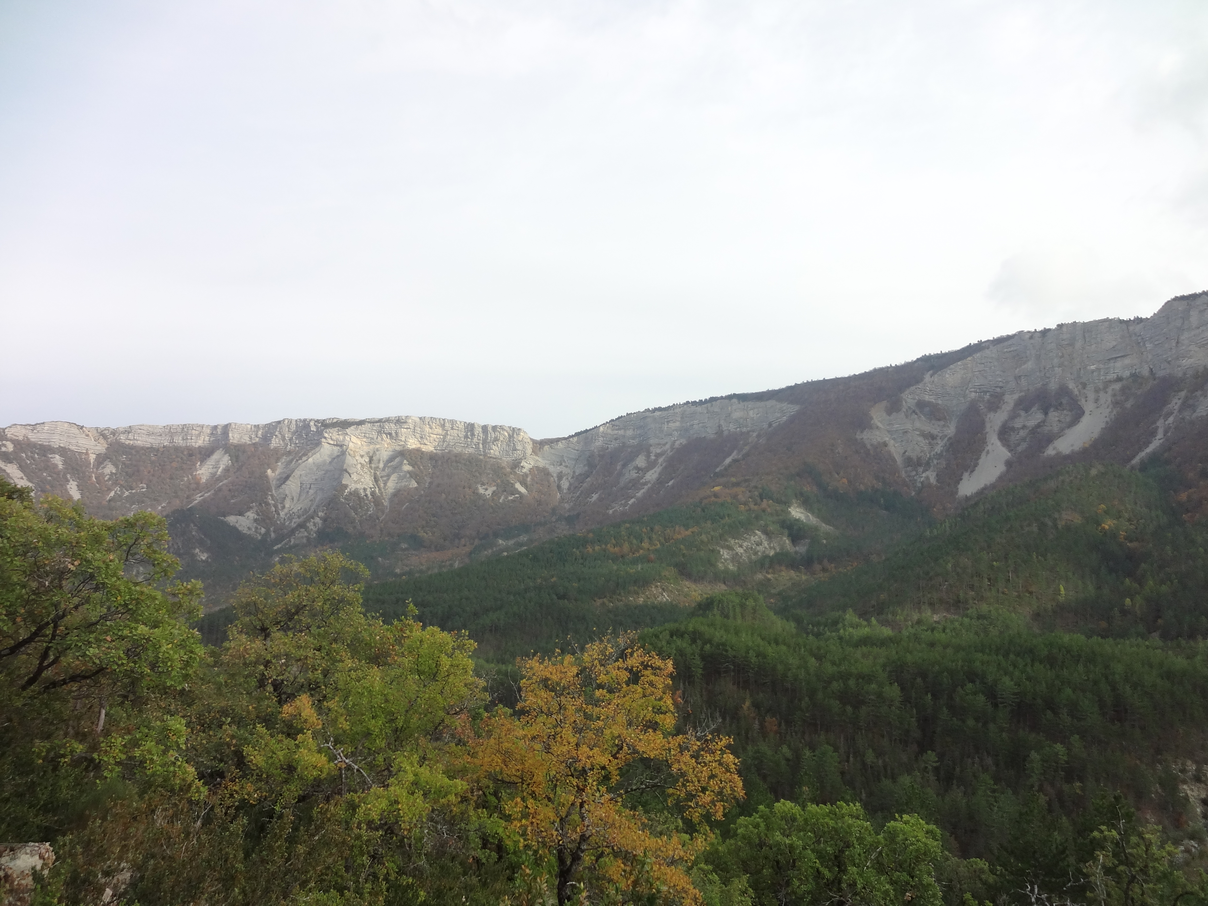 Cirque de Valbelle (1138 à 1353 m en crête)